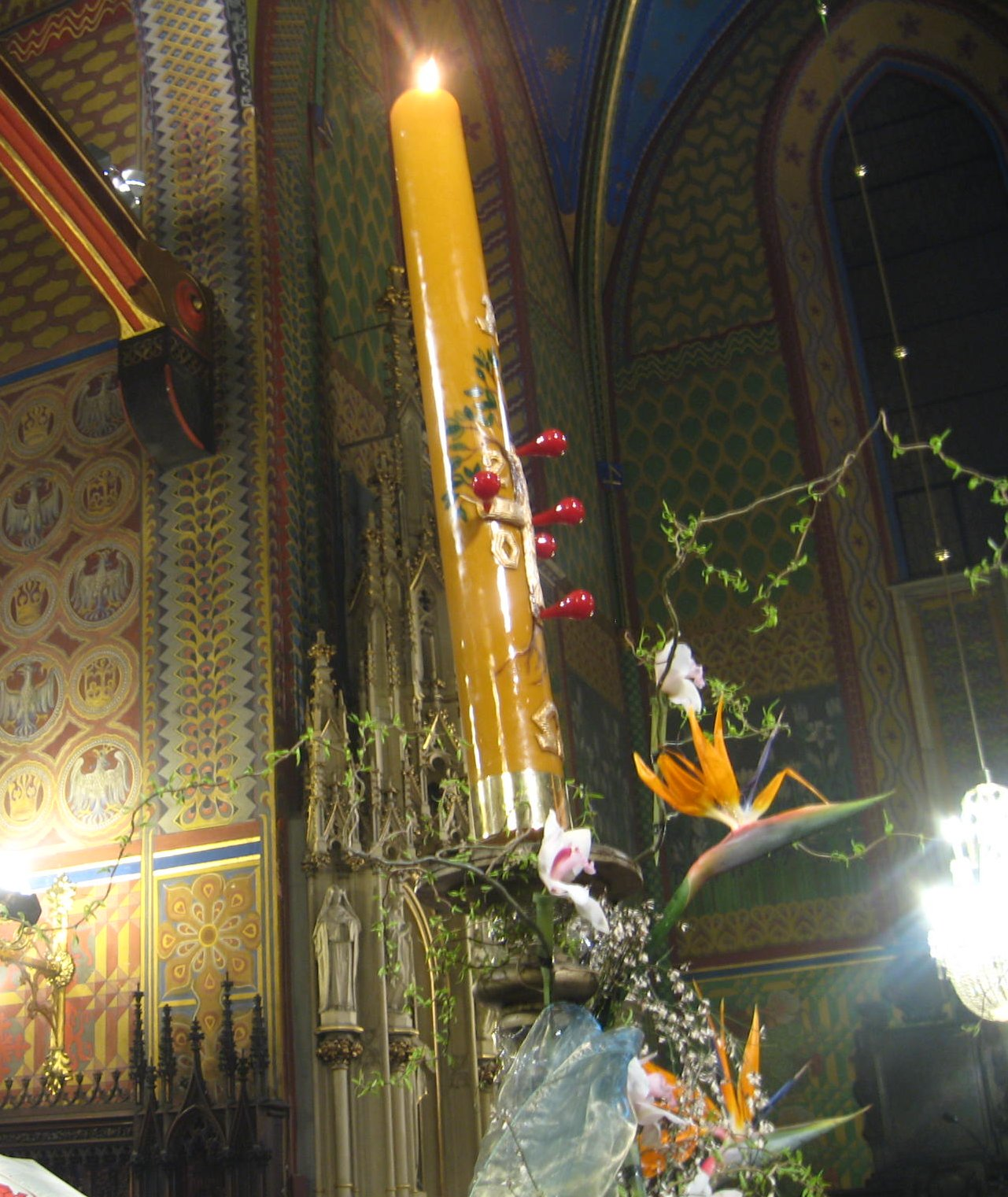 Paschał